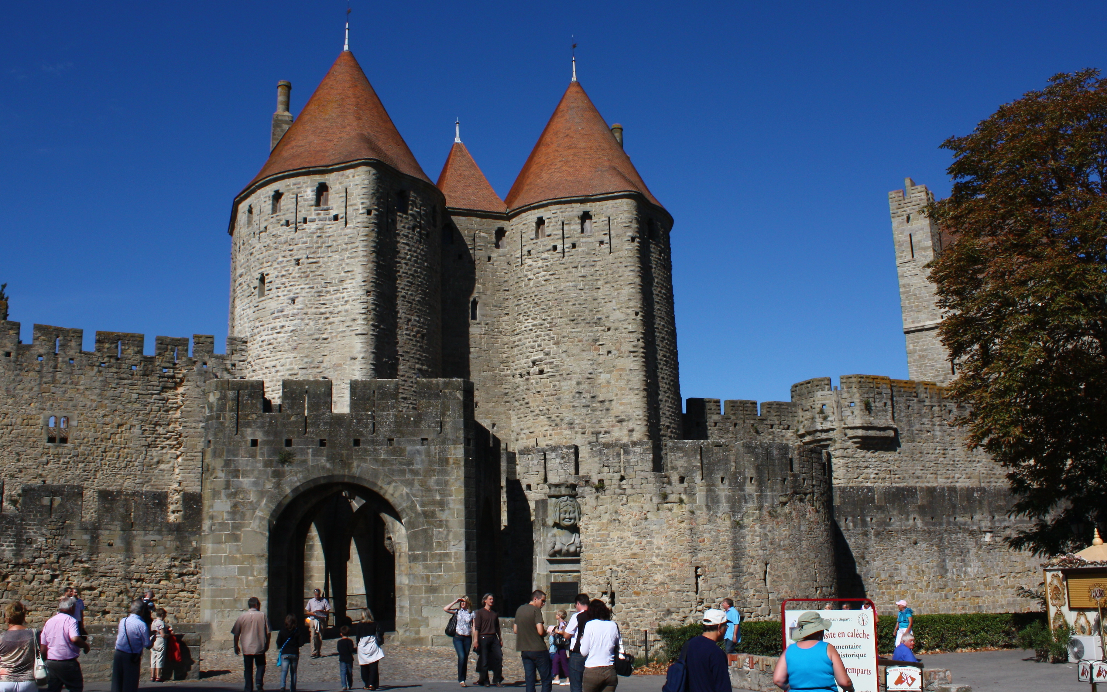 Carcassonne